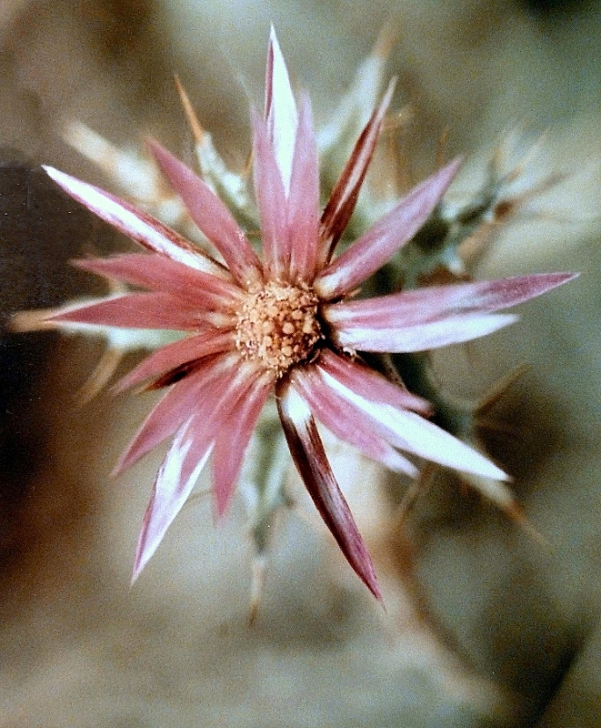 Carlina lanata (cardo peludillo) - Vista cenital - Gerakini Paralia, Península de Halkidiki, Grecia.